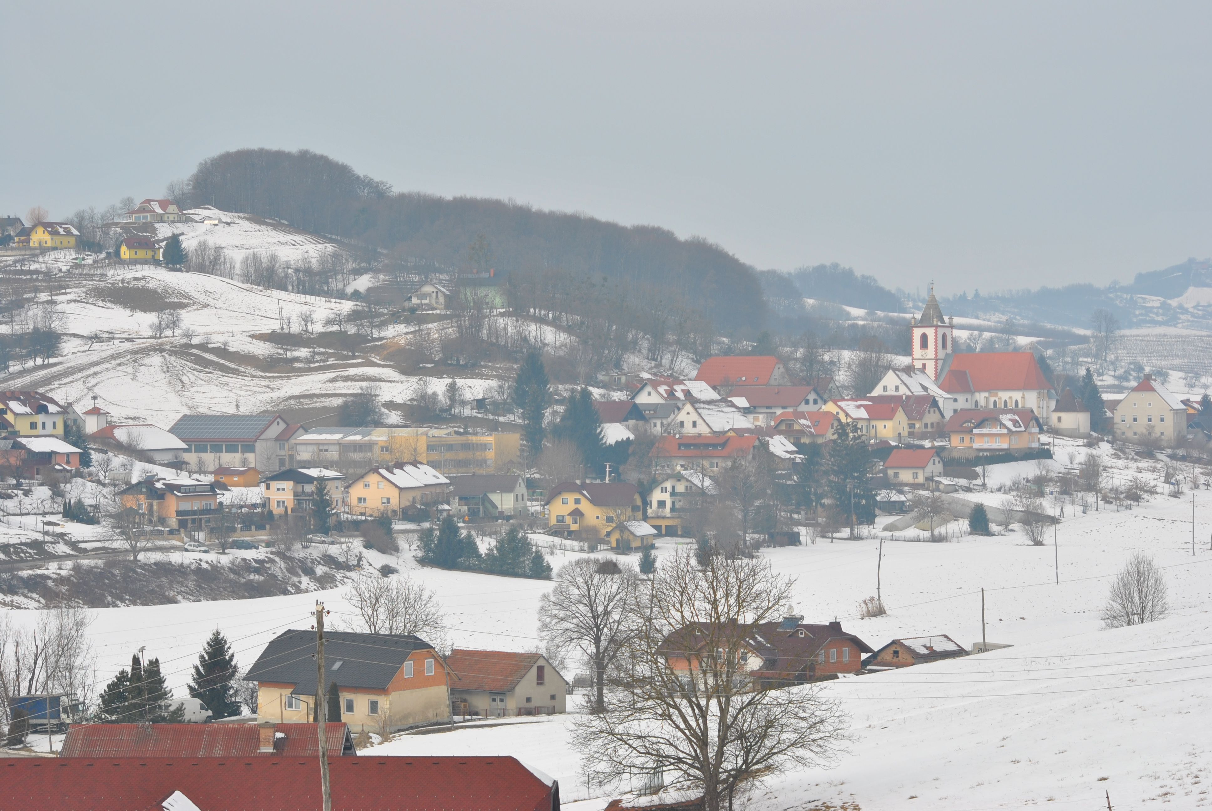 Jarenina pozimi- skrajno levo gasilski dom, šola, naselje , in Jareninska cerkev s kostnico